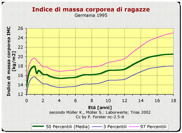 Grafica: Medicina: Peso corporeo: Indice di massa corporea di ragazze : IMC, BMI, età